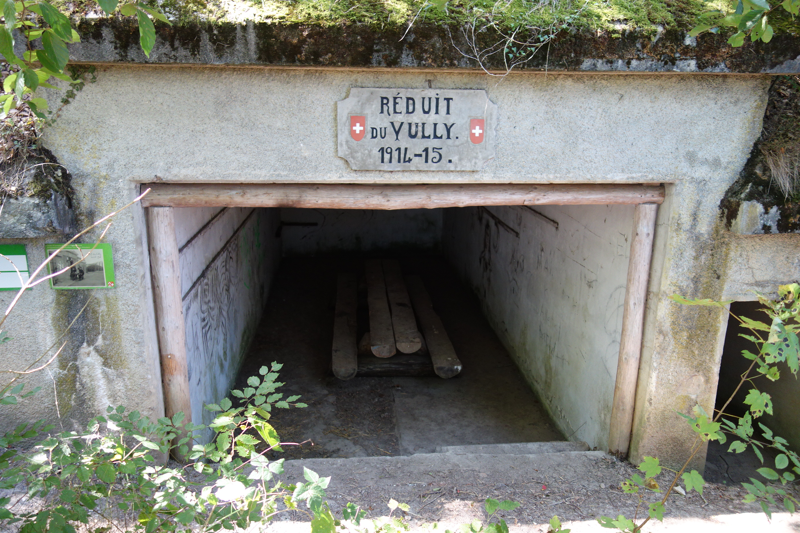 Stützpunkt Réduit du Vully, Mont Vully, Schweiz